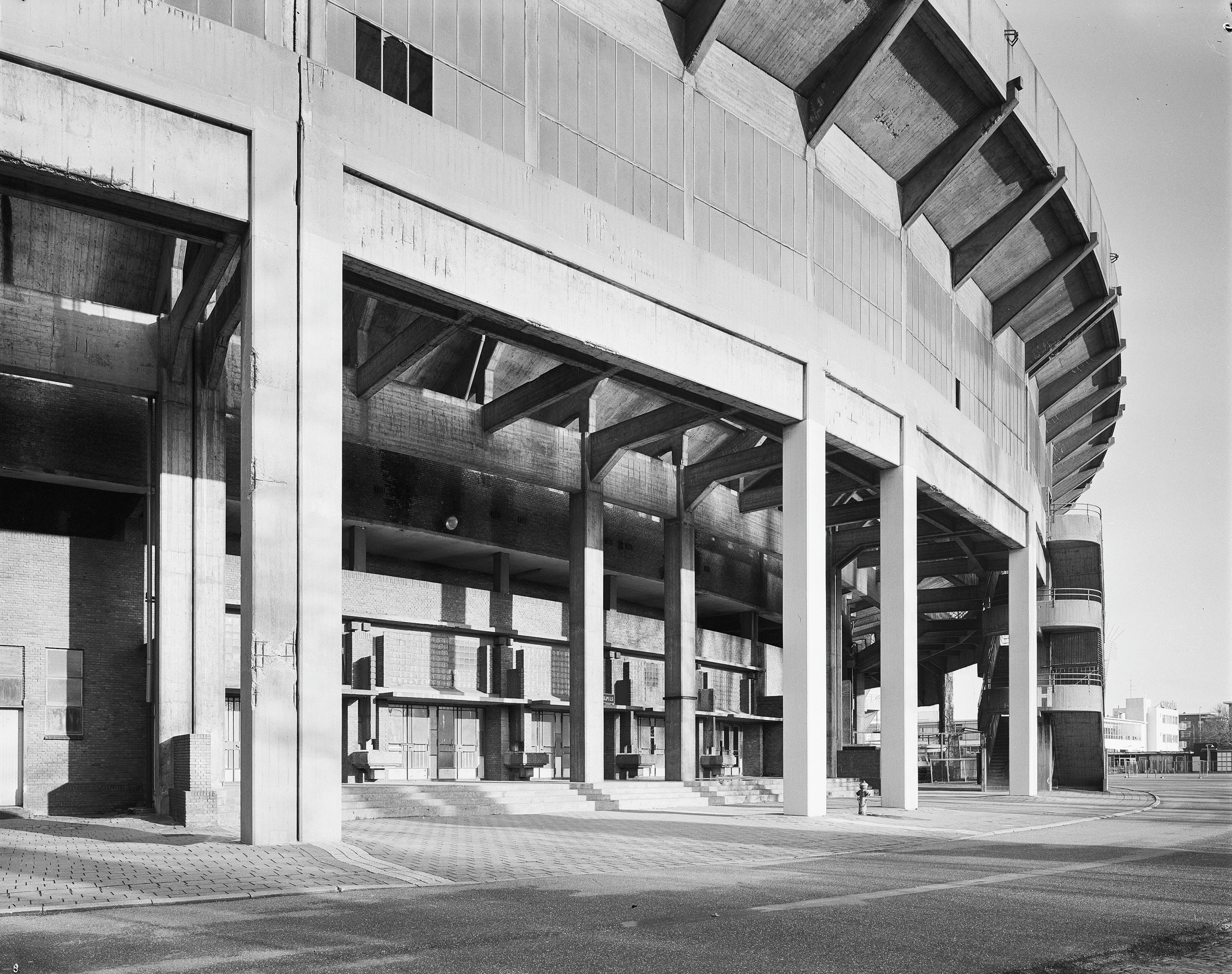 OLYMPISCH STADION: Exterieur ZUIDZIJDE, VOORMALIG ENTREE, CAFE